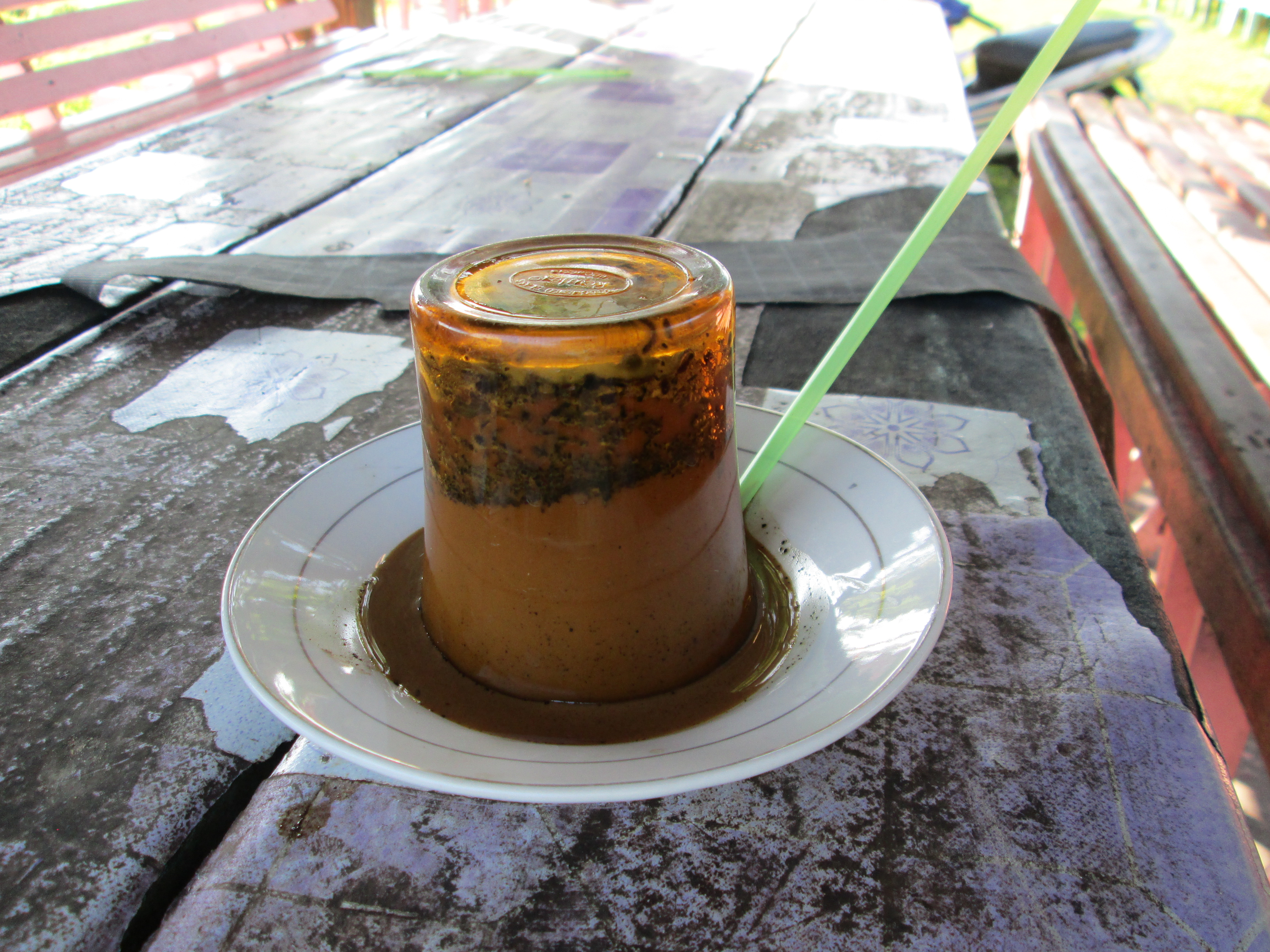 Kopi tubruk alias kopi terbalik Meulaboh